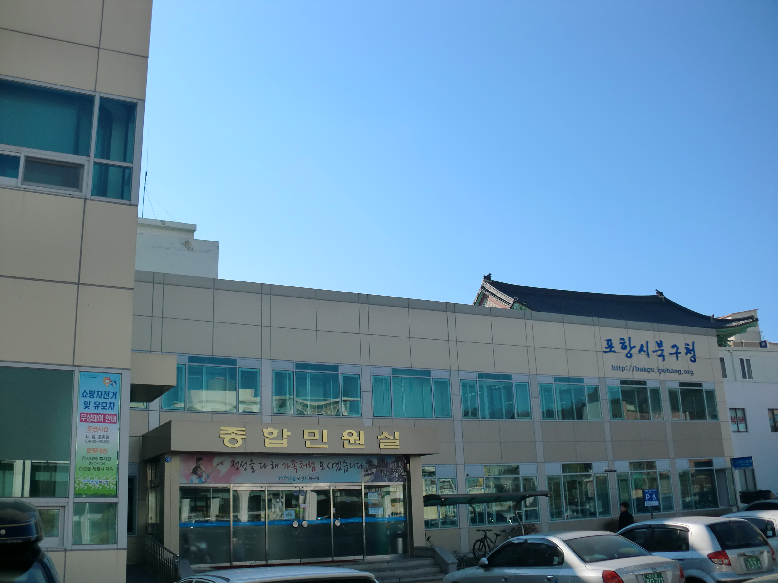 경상북도 포항시 북구에 있는 북구청